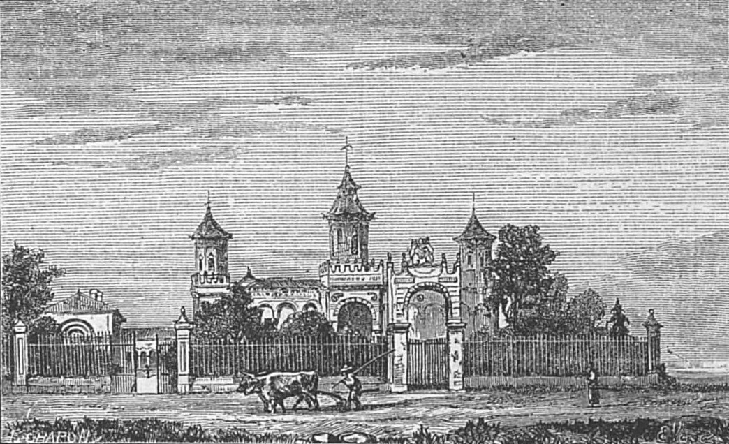 Illustration du Château Cos d'Estournel dans l'ouvrage Bordeaux et ses vins (6ème édition) de Charles Cocks et Edouard Féret publié en 1893